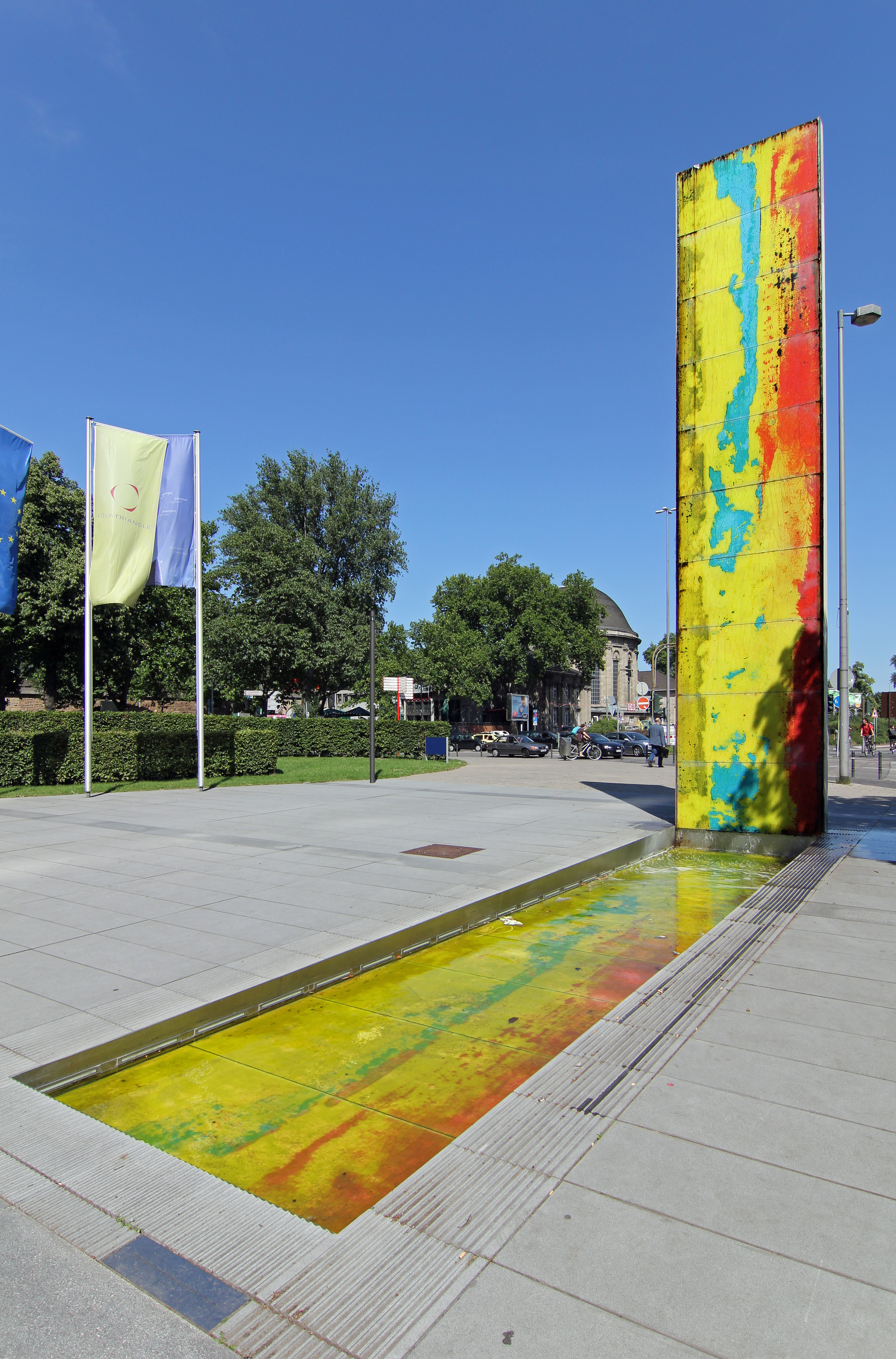 Brunnen von Rainer Gross, New York, 2006 in Köln am Ottoplatz 1, Deutz